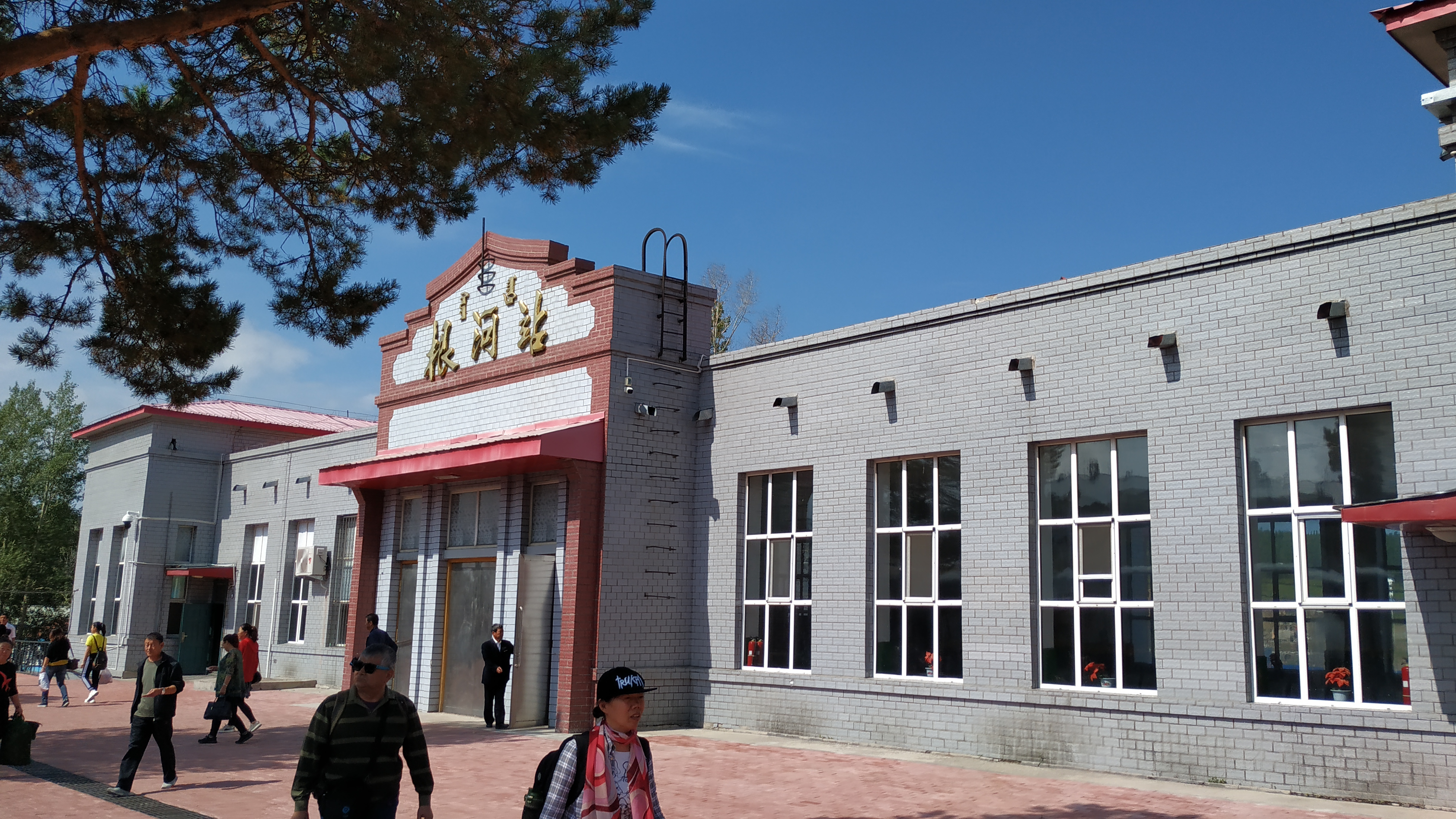 中文（中国大陆）: 根河站站房